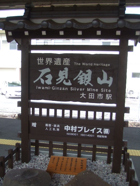 太田市駅 駅名標